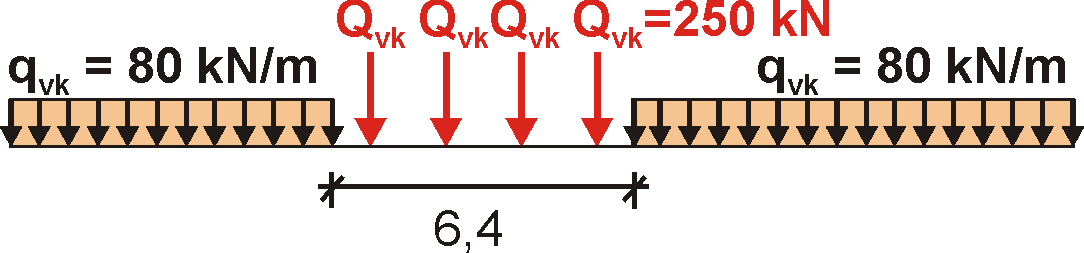 Lastmodell 71 für Eisenbahnbrücken des DIN Fachberichtes 101